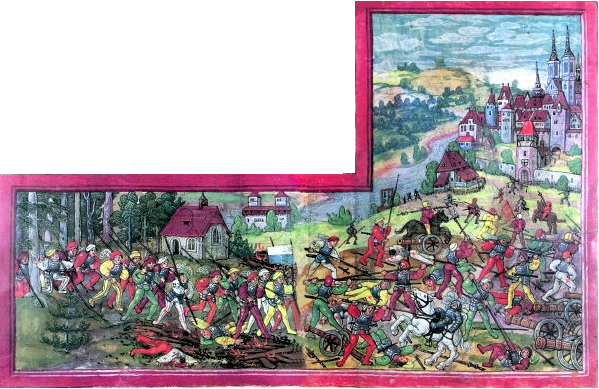 Die Schlacht bei Schwaderloh (Triboltingen) während des Schwabenkrieges, am 11. April 1499. Die gesamte Darstellung zeigt die drei Phasen der Schlacht: Links der Ansturm der Eidgenossen aus dem Wald, angeführt vom Bannerträger von Luzern; in der Mitte die eigentliche Schlacht, die schwäbische Artillerie und Kavallerie; auf der rechten Seite fliehen die Truppen des Schwäbischen Bundes gegen die offenen Tore der Stadt Konstanz. Im Hintergrund sind die Kapelle St. Niklaus in Triboltingen und das fürstbischöfliche Schloss Gottlieben am Rhein dargestellt.